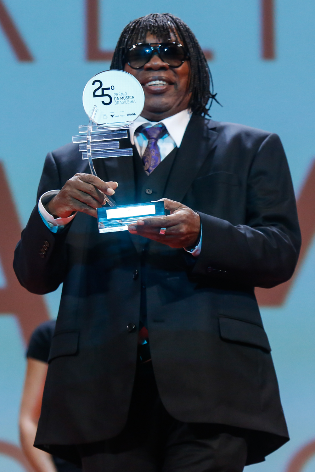 Categoria MPB - Cantor: Milton Nascimento durante o 25º Premio da Musica Brasileira no Theatro Municipal. Foto: Roberto Filho (14/05/14)